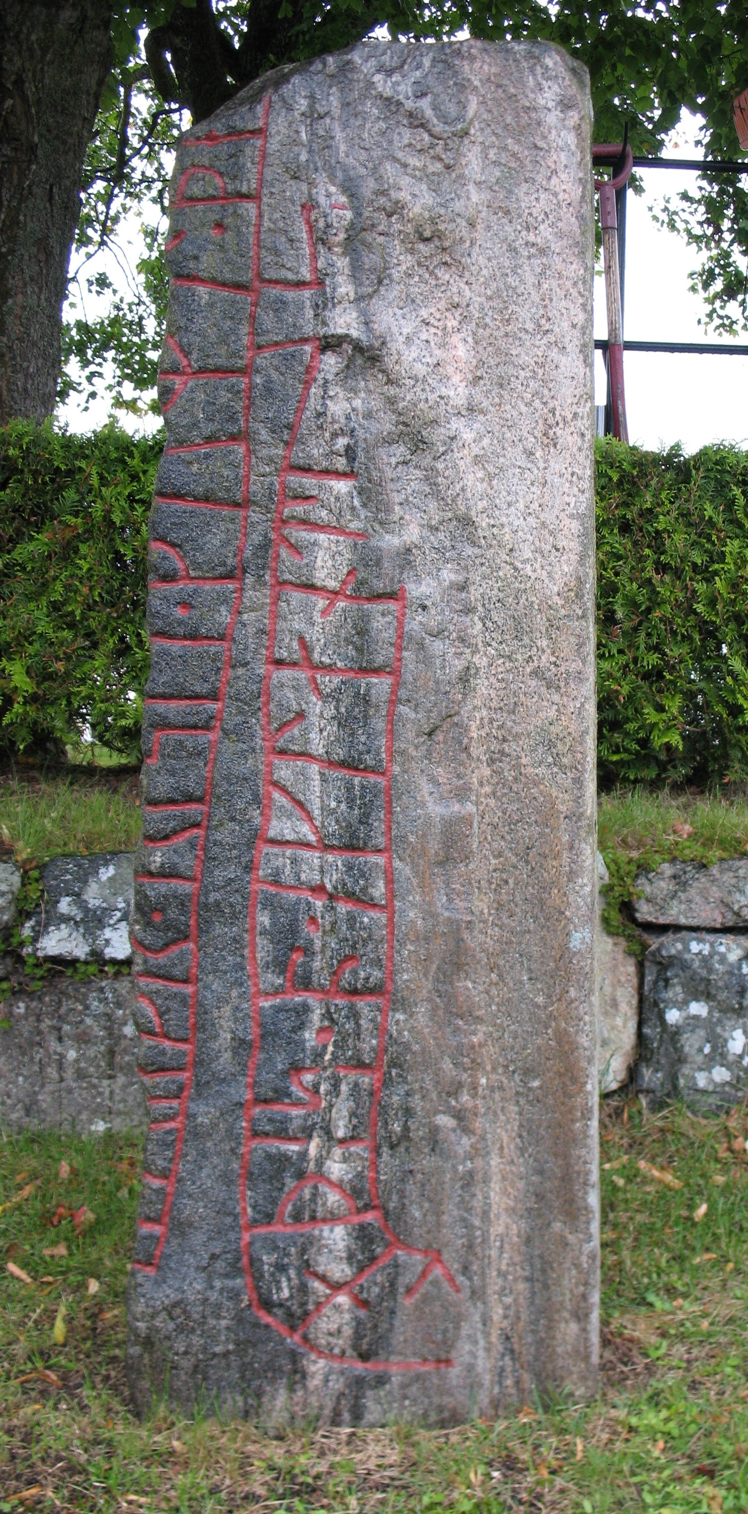 Runstenen Sm 27 i Berga socken, Ljungby kommun.